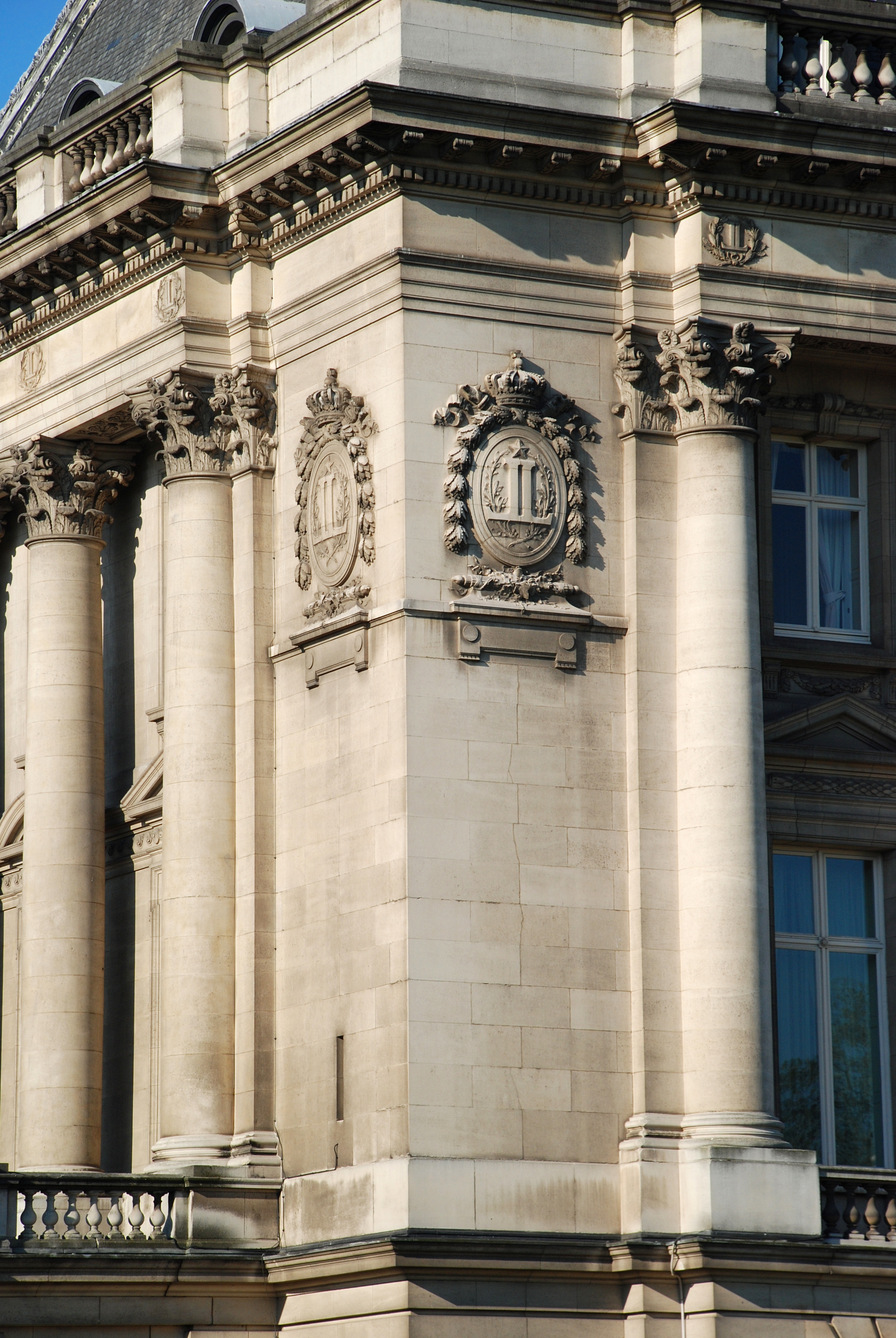 Belgique - Bruxelles - Palais Royal